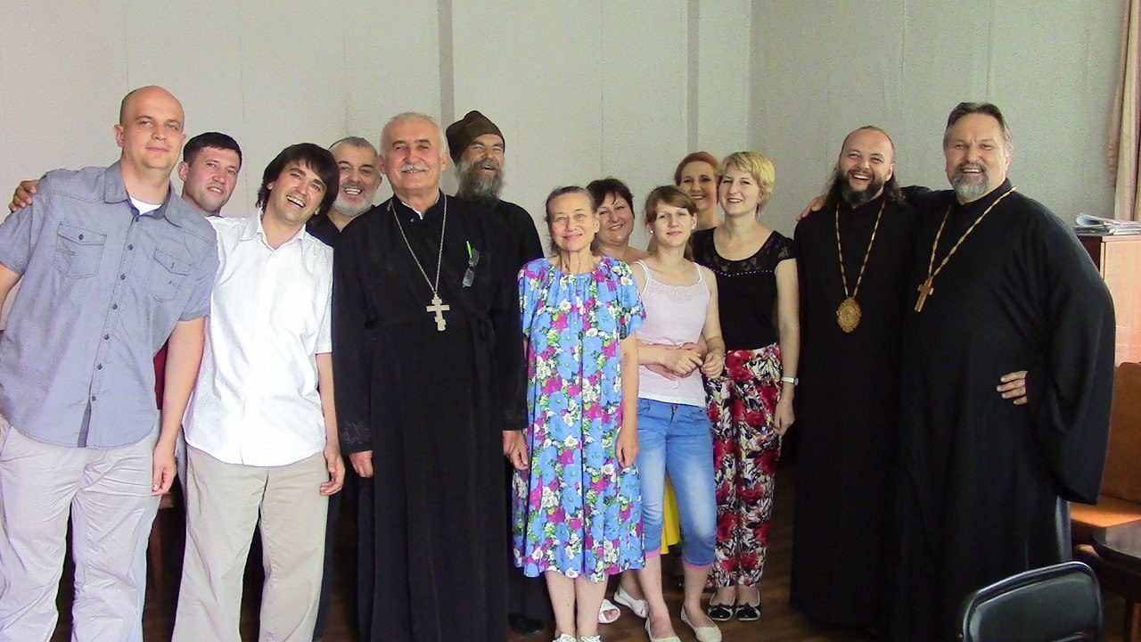 Архиепископ Реформаторской Православной Церкви Христа Спасителя (РПЦХС). С 1988 года начал служение в Русской Православной Церкви Московского Патриархата. С 1991 по 1996 был традиционным православным священником. В 1996 году пережил возвращение к Божьему Слову и личное пробуждение и стал реформатором. 3 февраля 2001 года был помазан на апостольское служение. Хиротонисан 14 января 2002 года собором православных обновленческих архиереев (АПЦВ) под председательством митрополита Стефана Линицкого